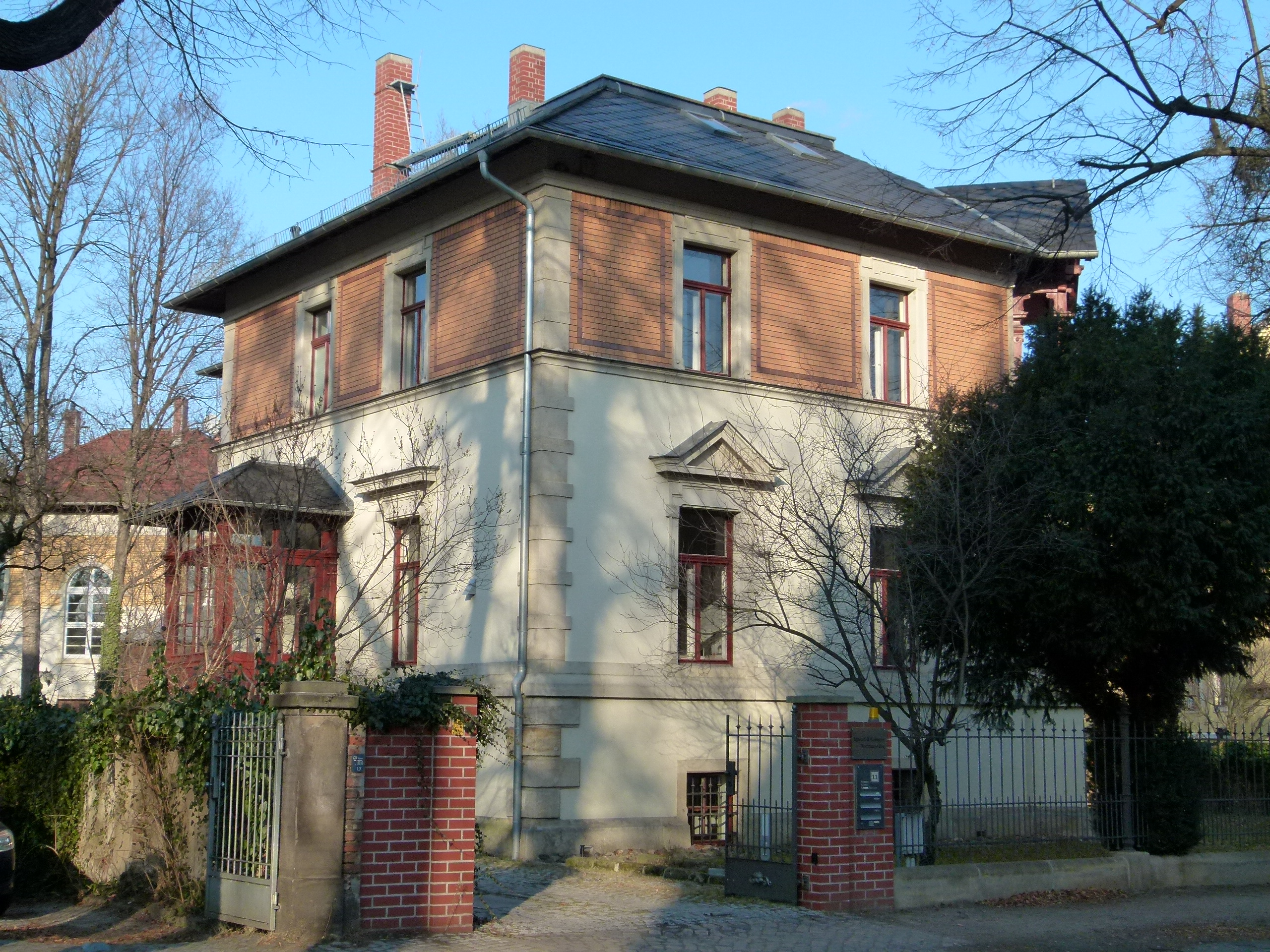 Denkmalgeschütztes Haus, Gustav-Adolf-Straße 11, Strehlen, Dresden